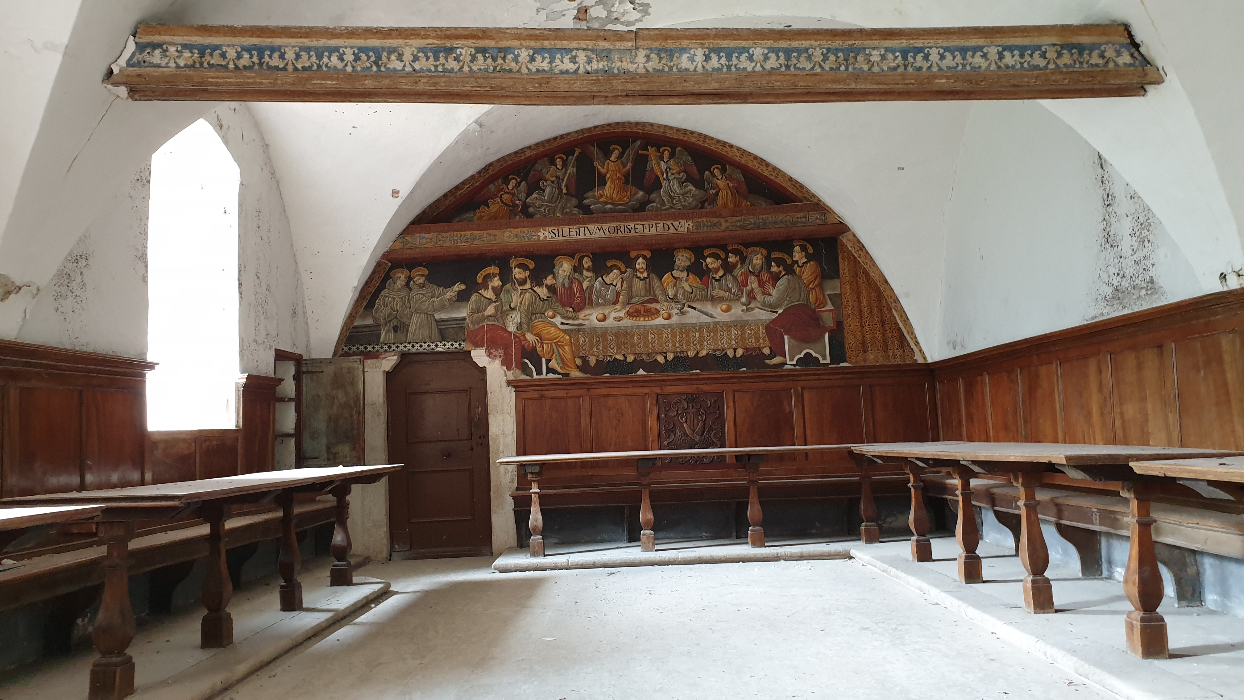 Convento di Sant'Angelo d'Ocre (AQ)